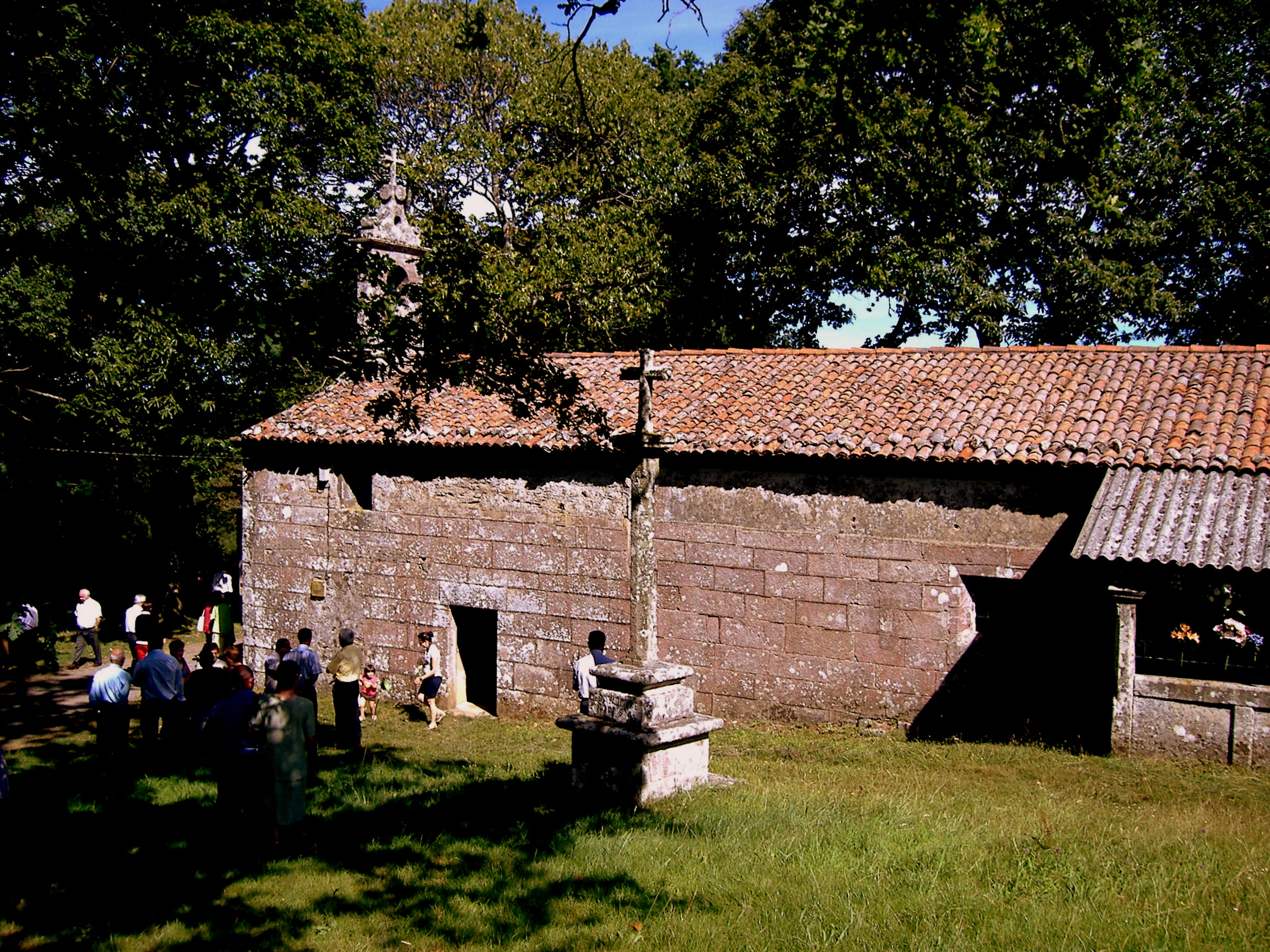 Capela de Santa Columba das Pías, concello de Sobrado.